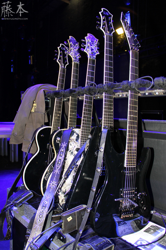 Passagem de som - HSBC Brasil - São Paulo/SP - 11/09/2011